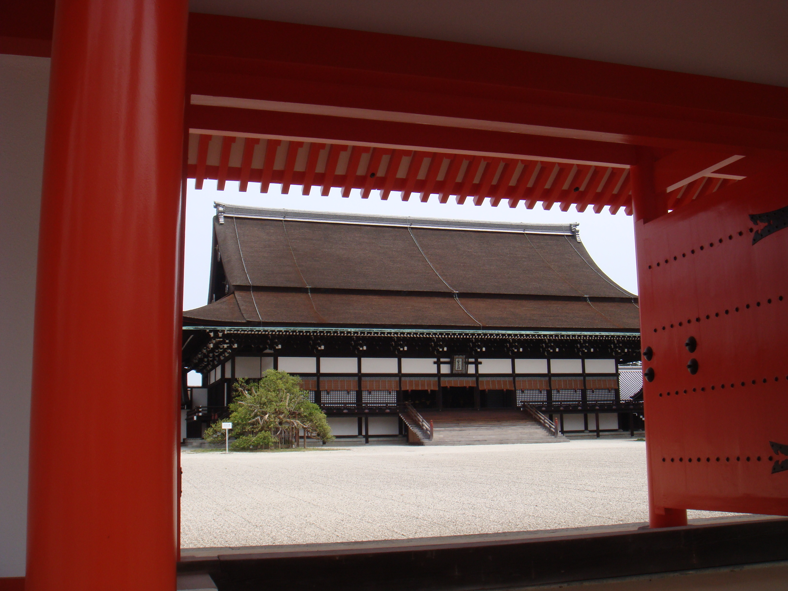 Kyoto